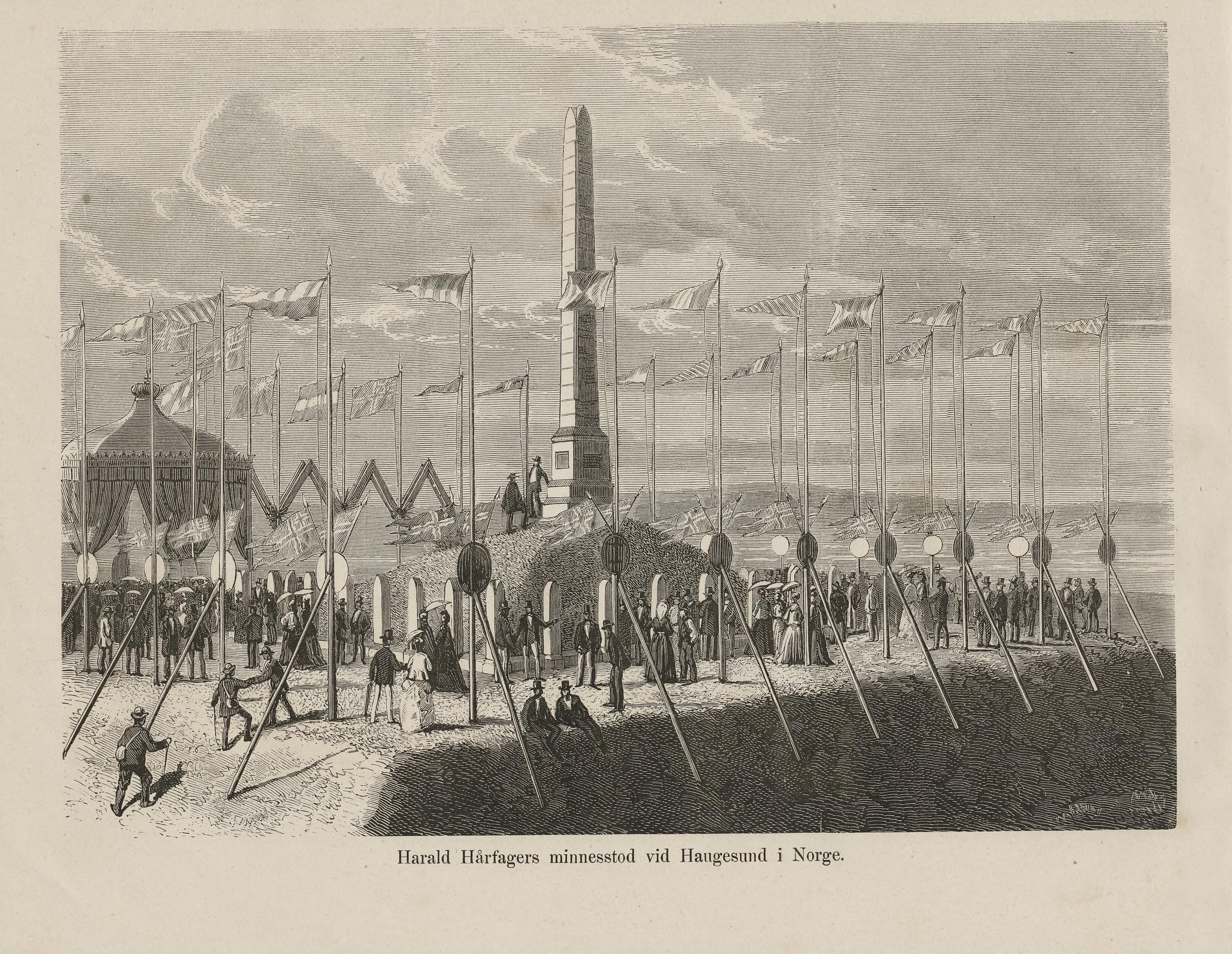 Illustrasjon hentet fra boken Nordiska taflor av ukjent forfatter og utgitt av Albert Bonnier (se, 1875)